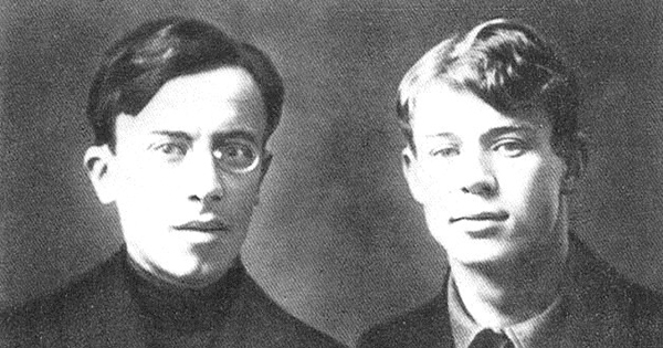 Леонид Каннесигер и Сергей Есенин